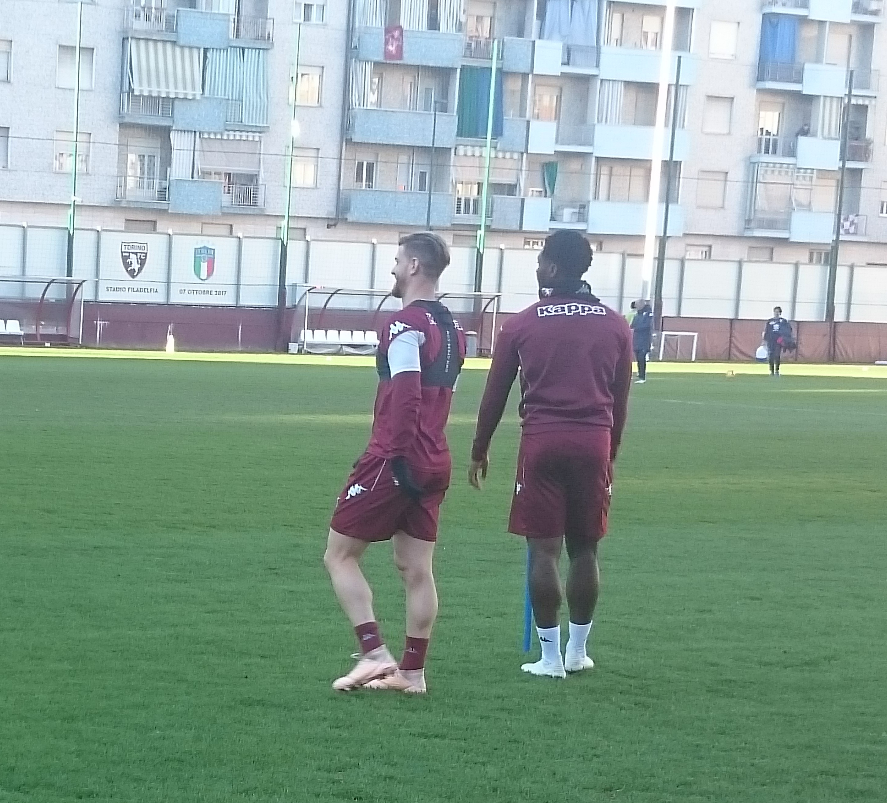 I calciatori Cristian Ansaldi(sinistra) e Ola Aina(destra) durante una sessione di allenamento sul campo secondario del Filadelfia.